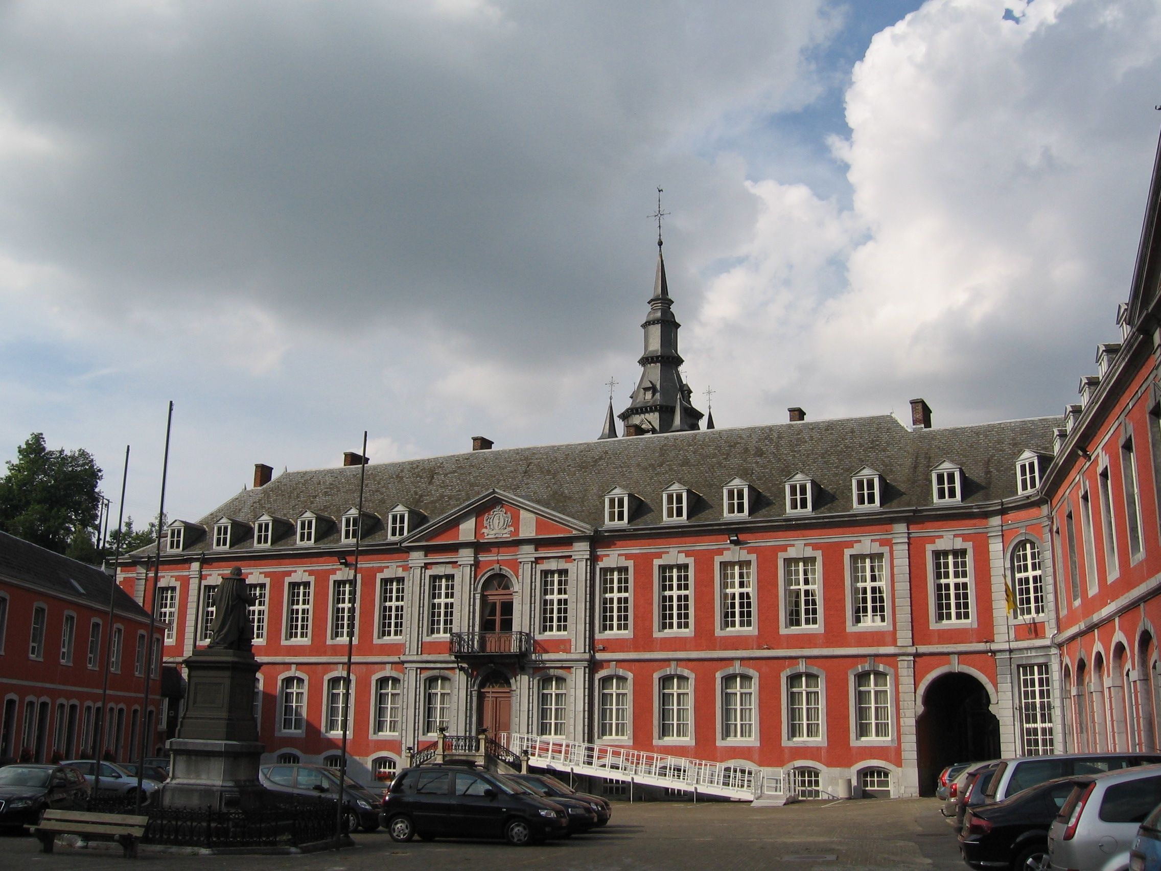 Le palais abbatial de l'ancienne abbaye Saint-Berthuin à Malonne (Belgique). Aujourd'hui fait partie de l'institut Saint-Berthuin.